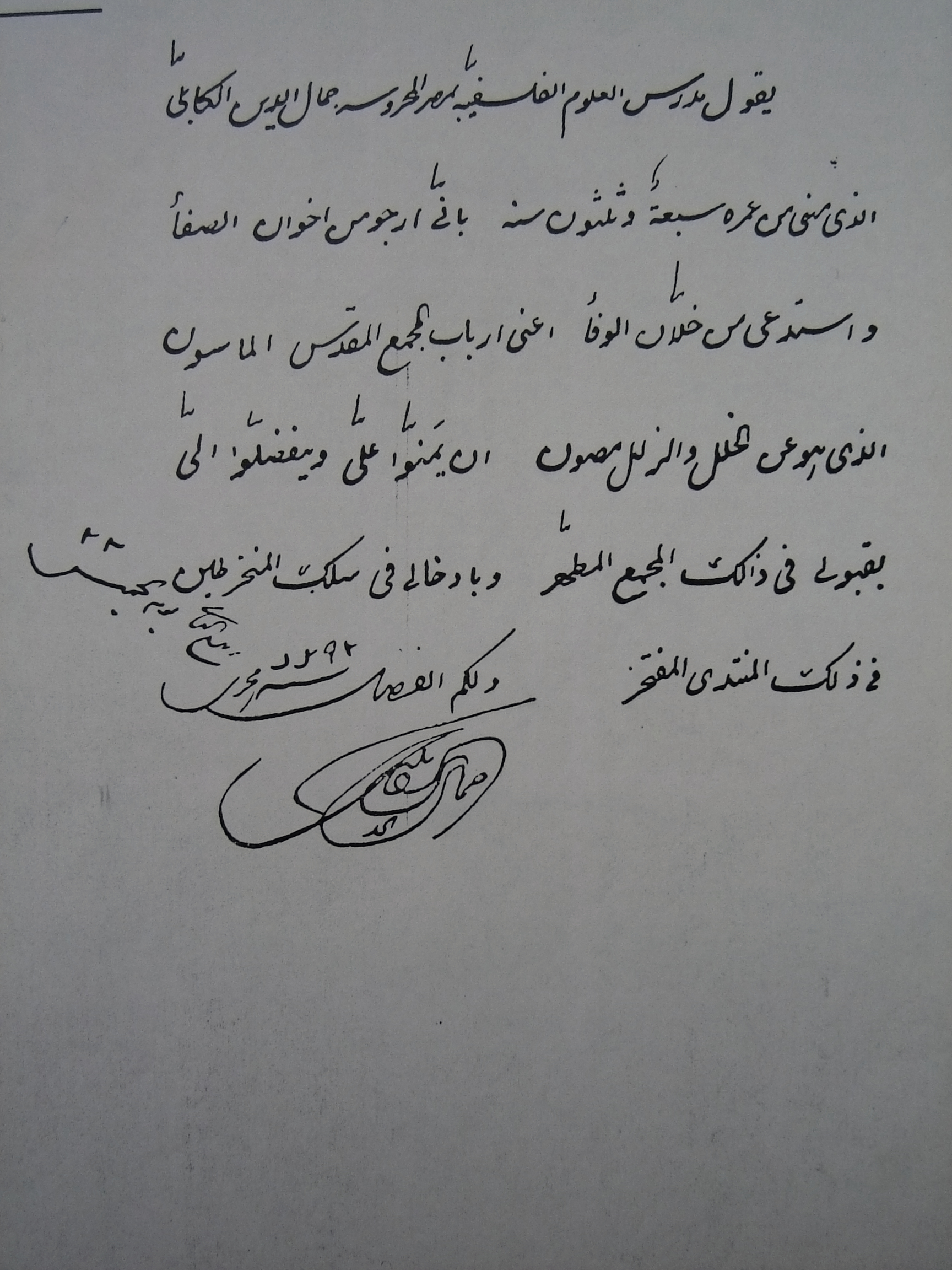 1876 trat al-Afghani der Freimaurerloge 'Stern des Ostens' (Kaukab asch-scharq) in Ägypten bei, welche zur angelsächsischen Großloge gehörte. In seinem Schreiben an die Loge, in dem er um Aufnahme bat, erklärte er diesen Wunsch damit, dass er sich den humanitären Zielen der Freimaurerei verpflichtet fühle: Ǧamāl ad-Dīn al-Kābulī, Lehrer der Philosophie in Kairo – Gott möge es beschützen –, dem siebenunddreißig Jahre von seinem Leben beschert wurden, sagt: ich bitte die Brüder der Reinheit und rufe die Freunde der Treue, ich meine (damit) die Herren der heiligen Vereinigung der Freimaurer ohne Makel und Tadel, dass sie mir die Gnade erweisen und mich beehren, mich in diese rechtschaffene Vereinigung aufzunehmen und in diesen vorzüglichen Klub einzugliedern. Hochachtungsvoll Donnerstag, am 22. Rabīʿ II. 1292 (Unterschrift)